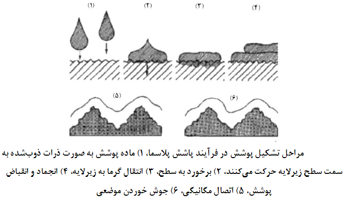 پوشش حاصل از پلاسما اسپری